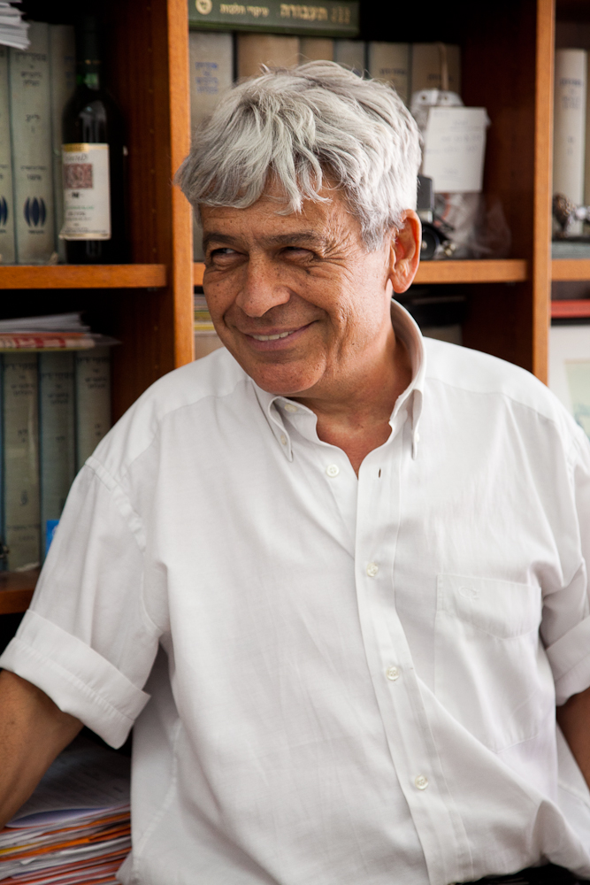 עו"ד אילון אורון